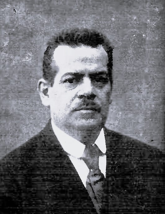 Gustav Ehlers, Wortführer der Bürgerschaft zu Lübeck seit 14. April 1919.